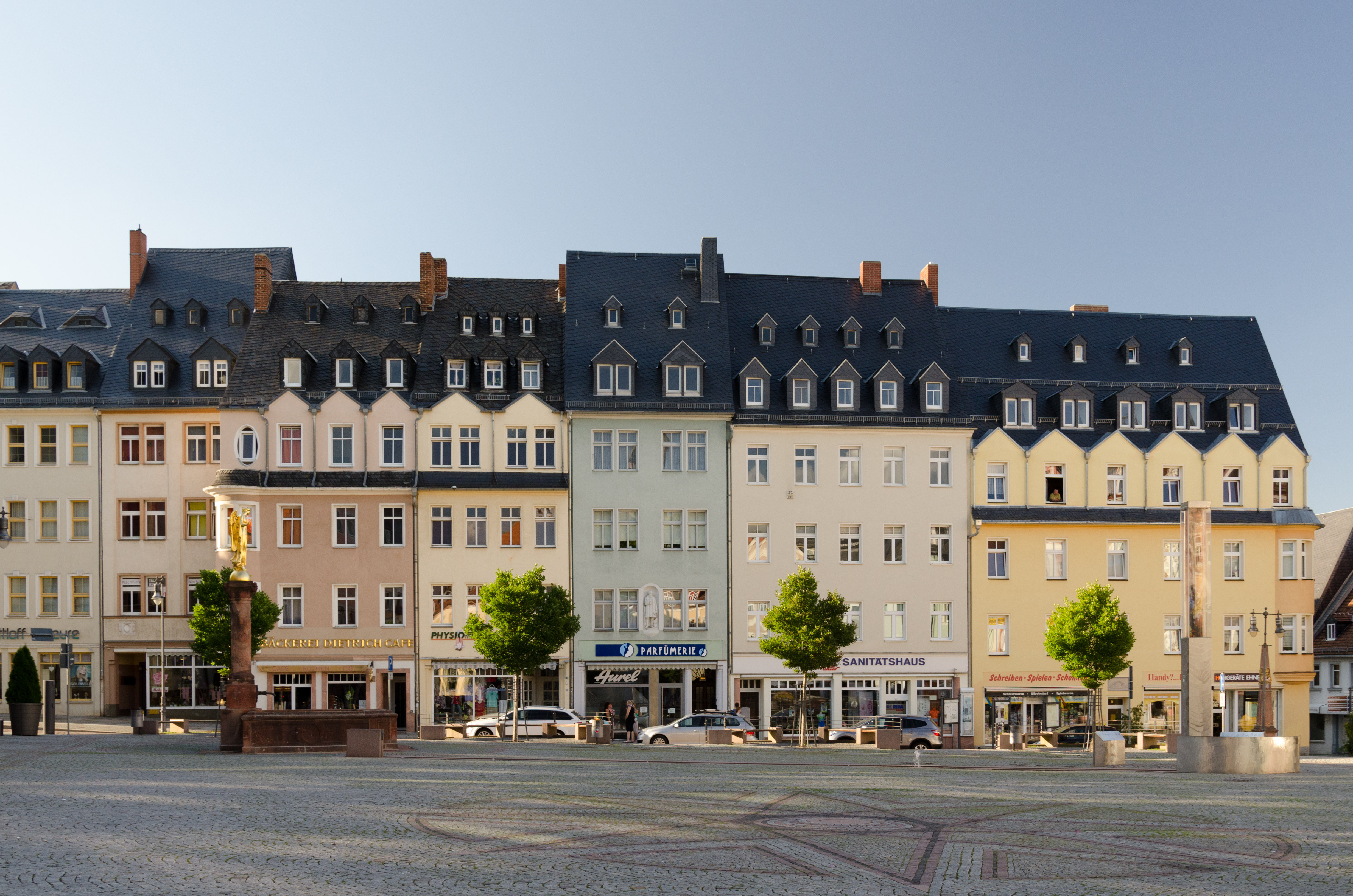 Mittweida, Markt 4, 5, 6, 7, 8, 9